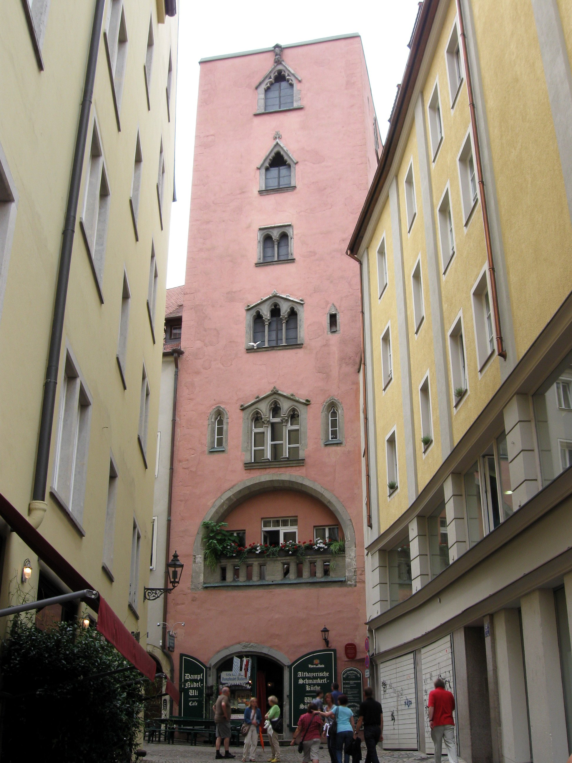 Watmarkt 4. Baumburger Turm, siebengeschossiger Turm mit Laube und reichem Dekor, frühgotische Hauskapelle, 3. Viertel 13. Jh., Anbau viergeschossiges und traufständiges Wohnhaus mit Frackdach, 15. Jh., mit Fortsetzung zur Kramgasse, Renaissance-Hof des 16. Jh.